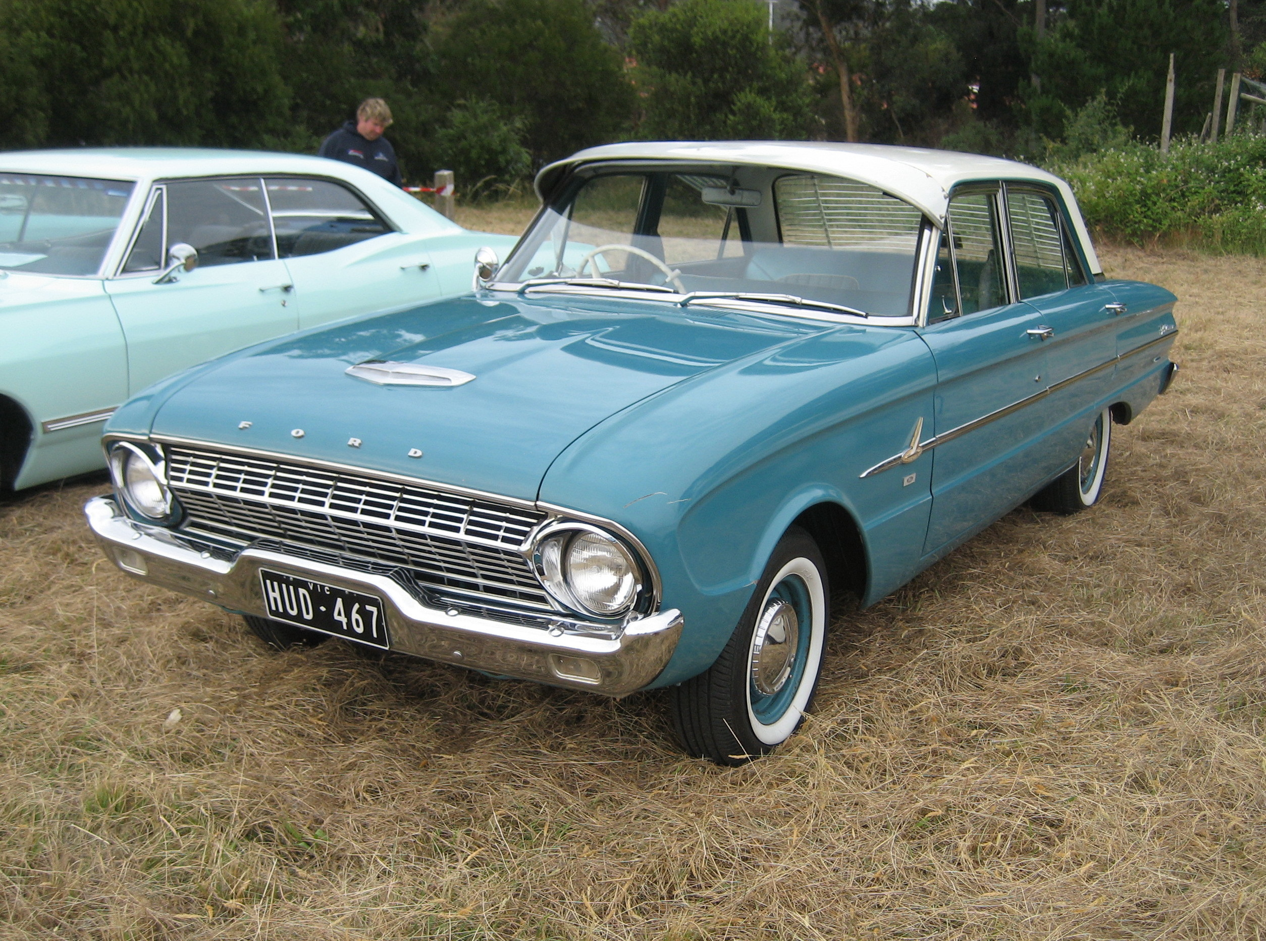 1963 Ford XL Falcon Deluxe Sedan